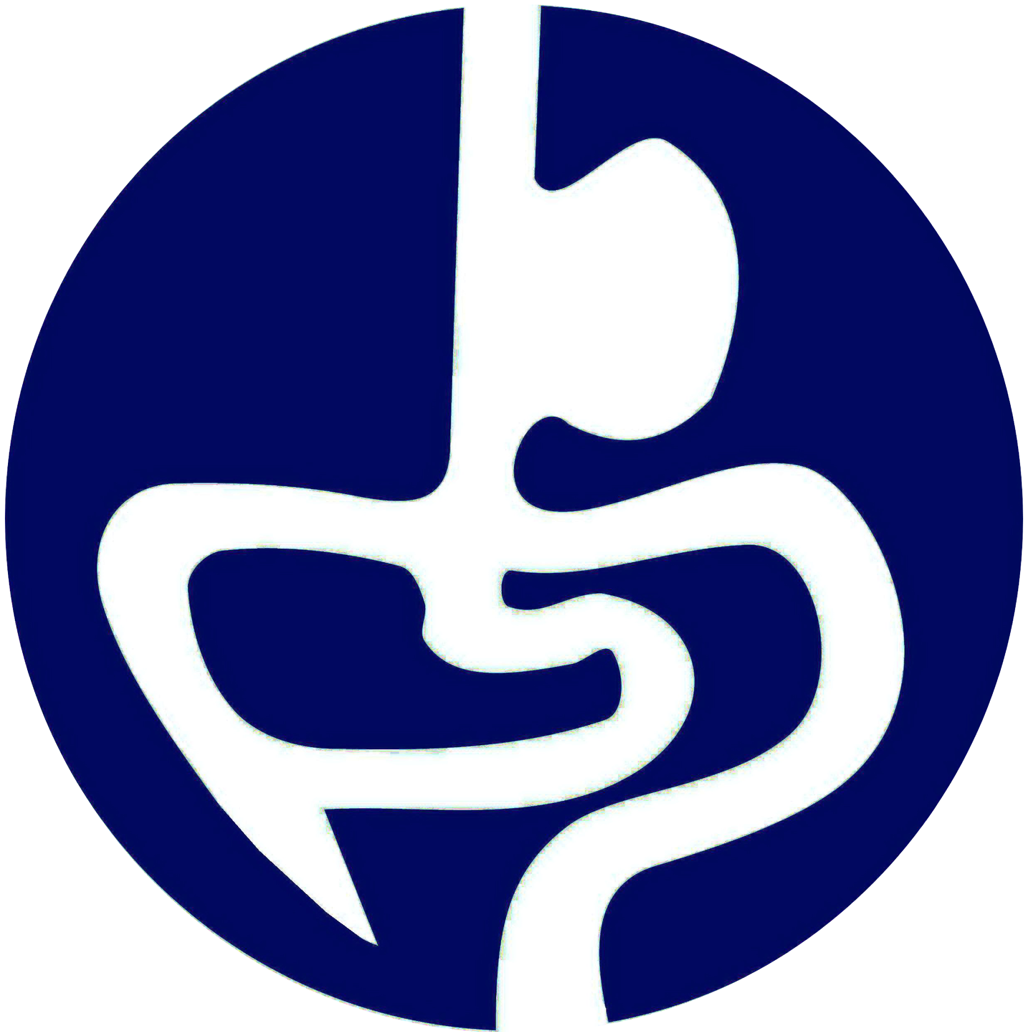 Logo resmi Perhimpunan Endoskopi Gastrointestinal Indonesia